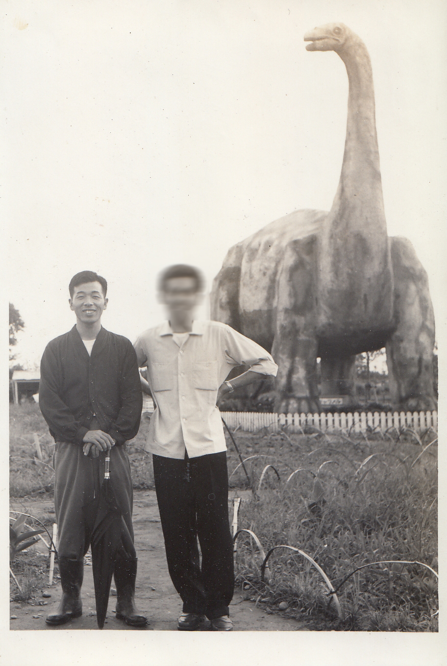 昭和30年8月27日 二子玉川園内にて（この写真は昭和30年に同園で開催された「恐竜展」で撮影したそうです）